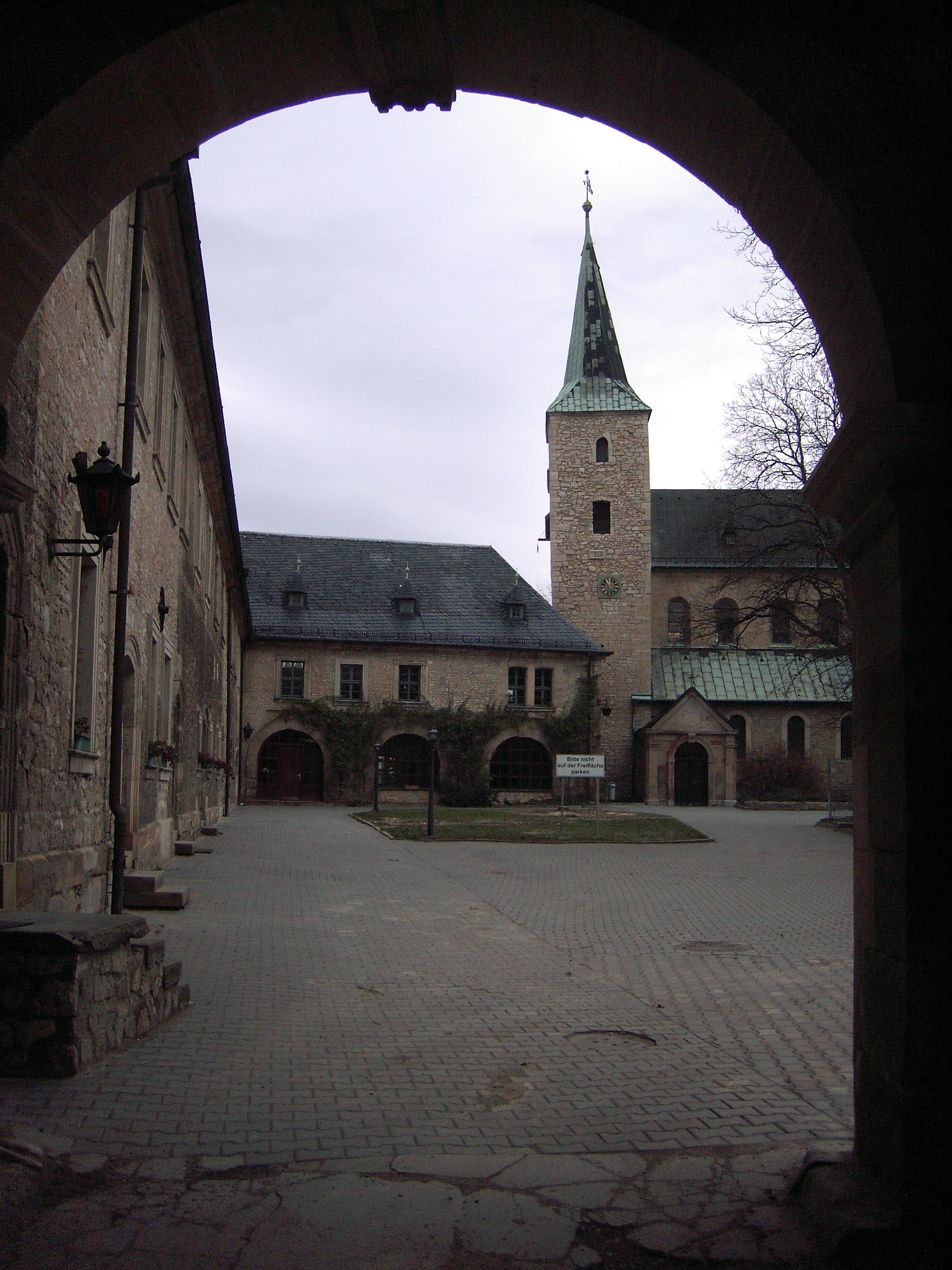 Kirche und Pfarrsaal im Kloster Huysburg